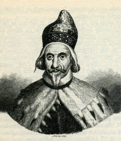 Портрет дожа Венеции Карло Контарини (1655-1656)